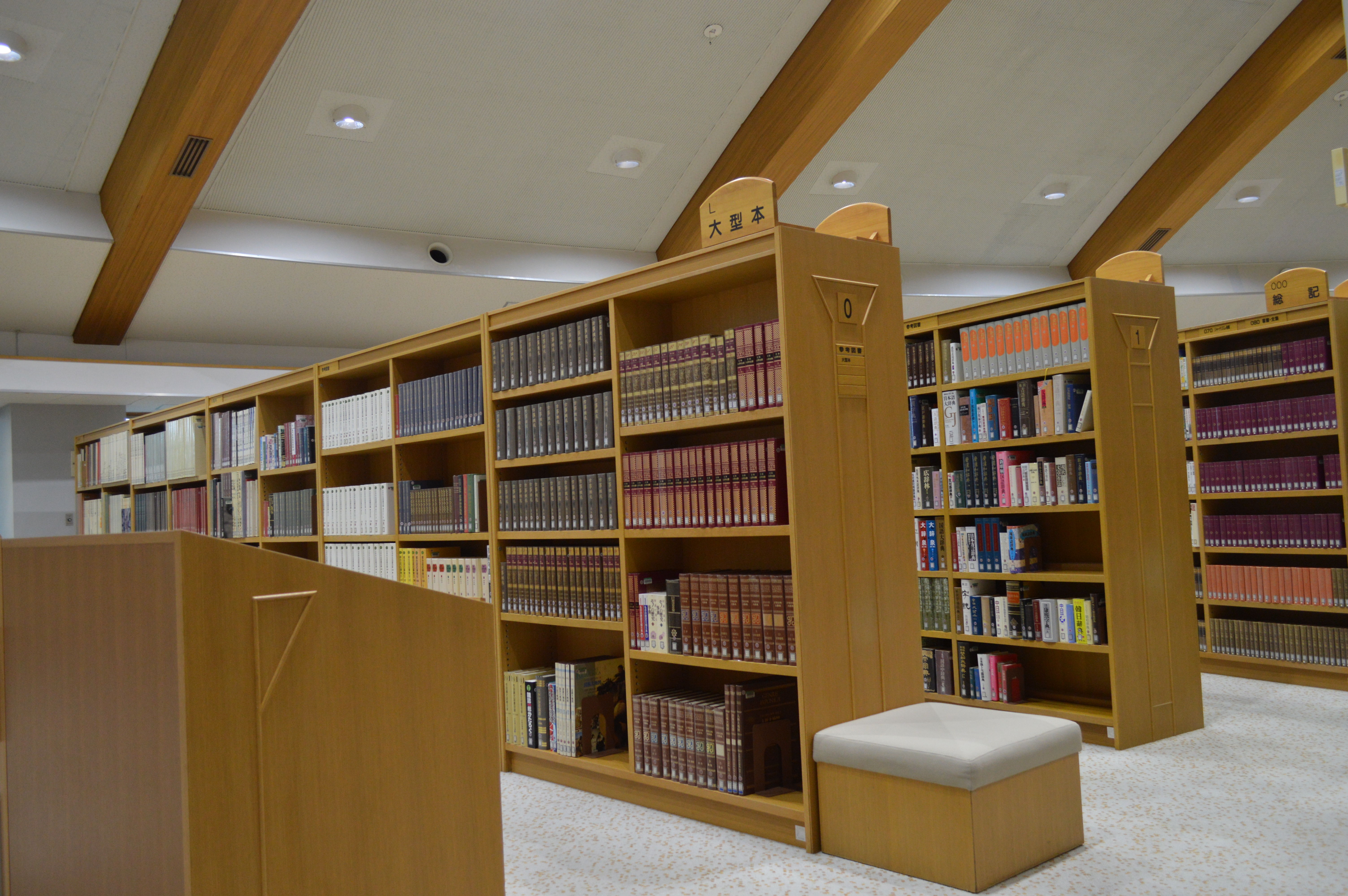 愛知県知多郡の東浦町中央図書館。2階。